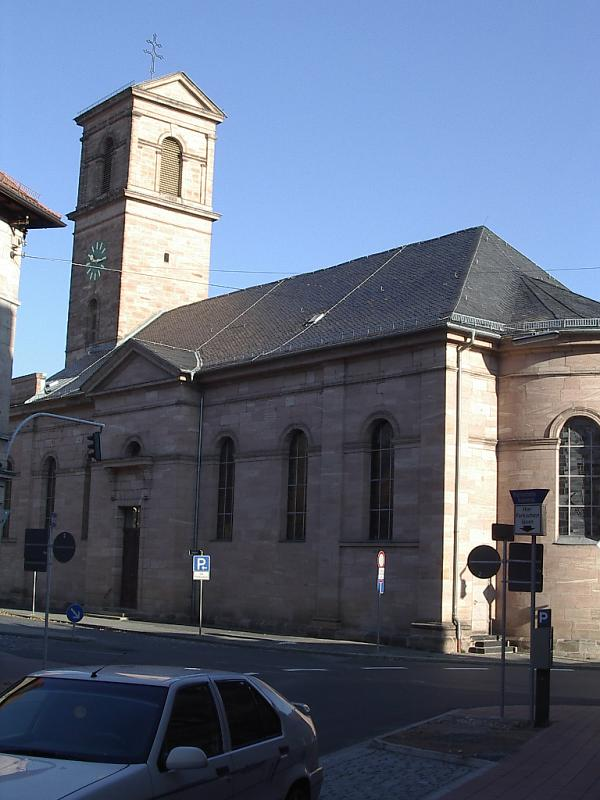 Fürth, Kath. Kirche Unser Lieben Frau, von SO.